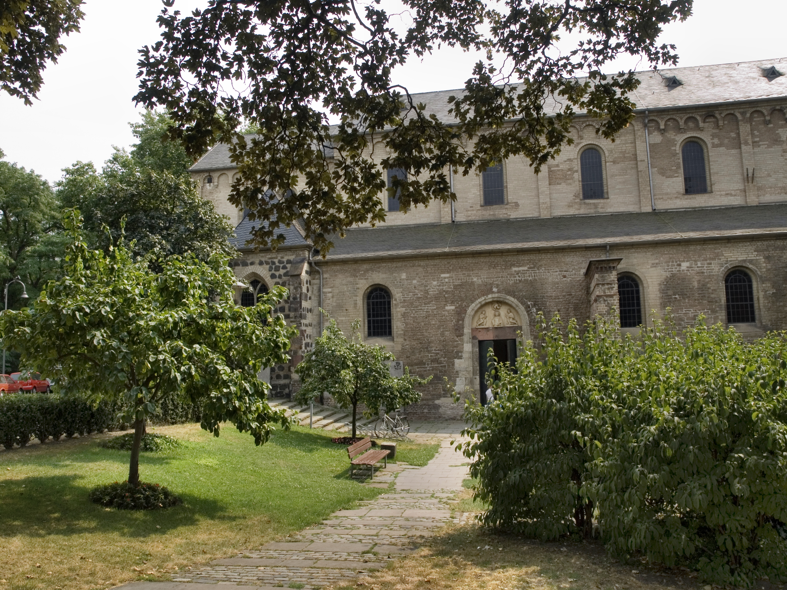 Северный Рейн-Вестфалия, Кёльн - церковь Святой Кикилии Римской